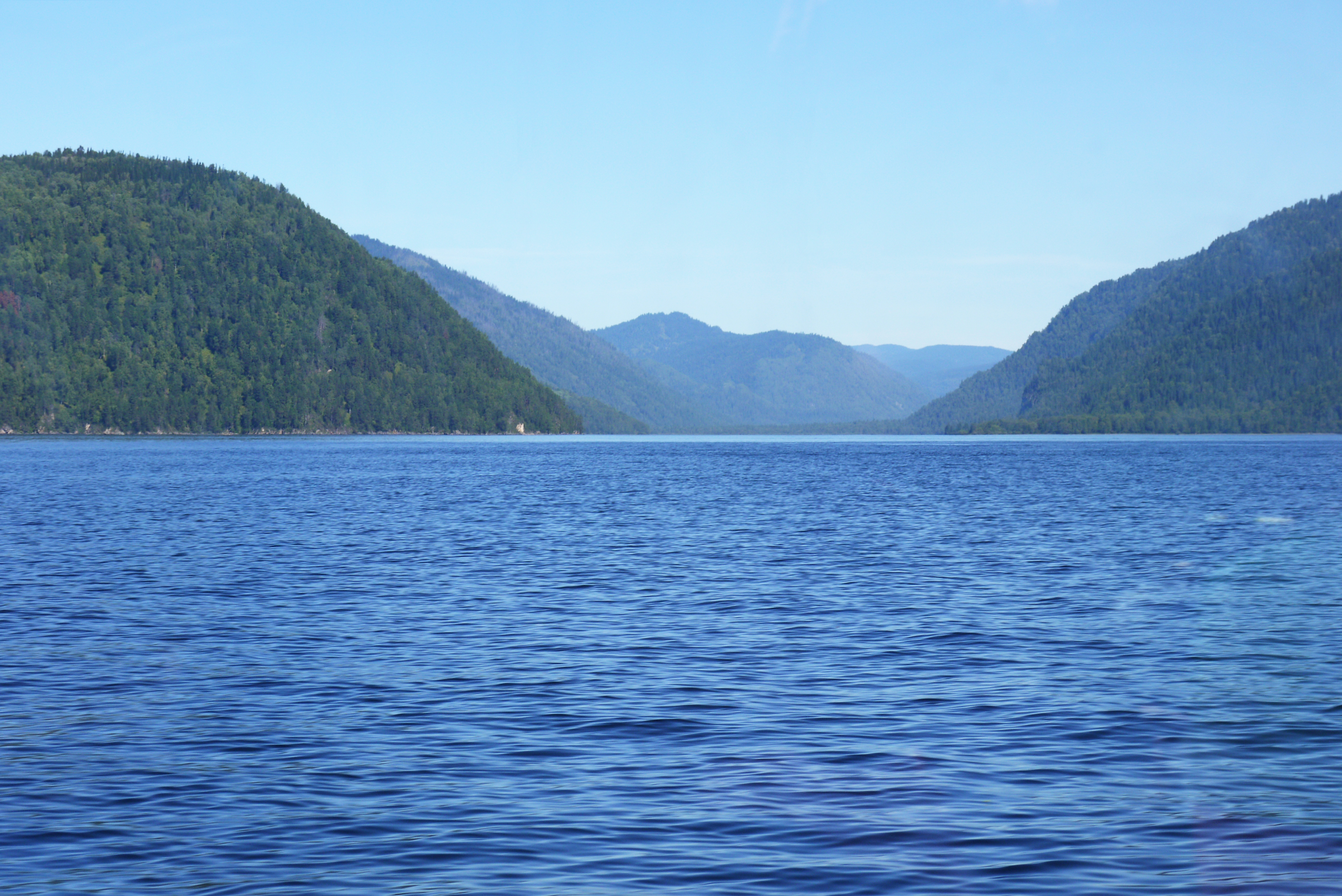 Алтайский заповедник: Алтайский заповедник расположен в центре Алтае-Саянской горной страны,Турочакский район, Алтай This image is related to the protected area of Russia number 0400028